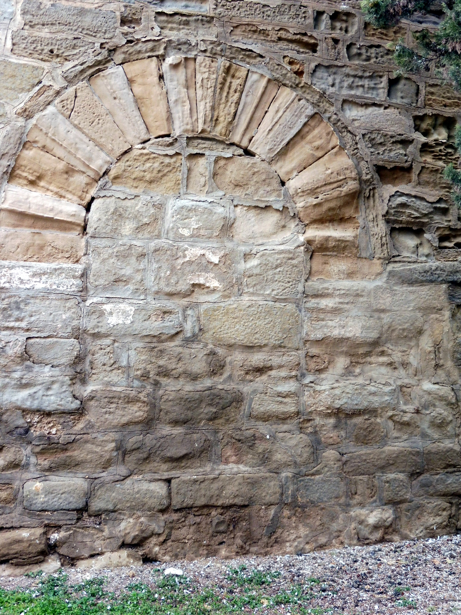 Església de l'Assumpció de Boldú (la Fuliola): primitiva porta tapiada